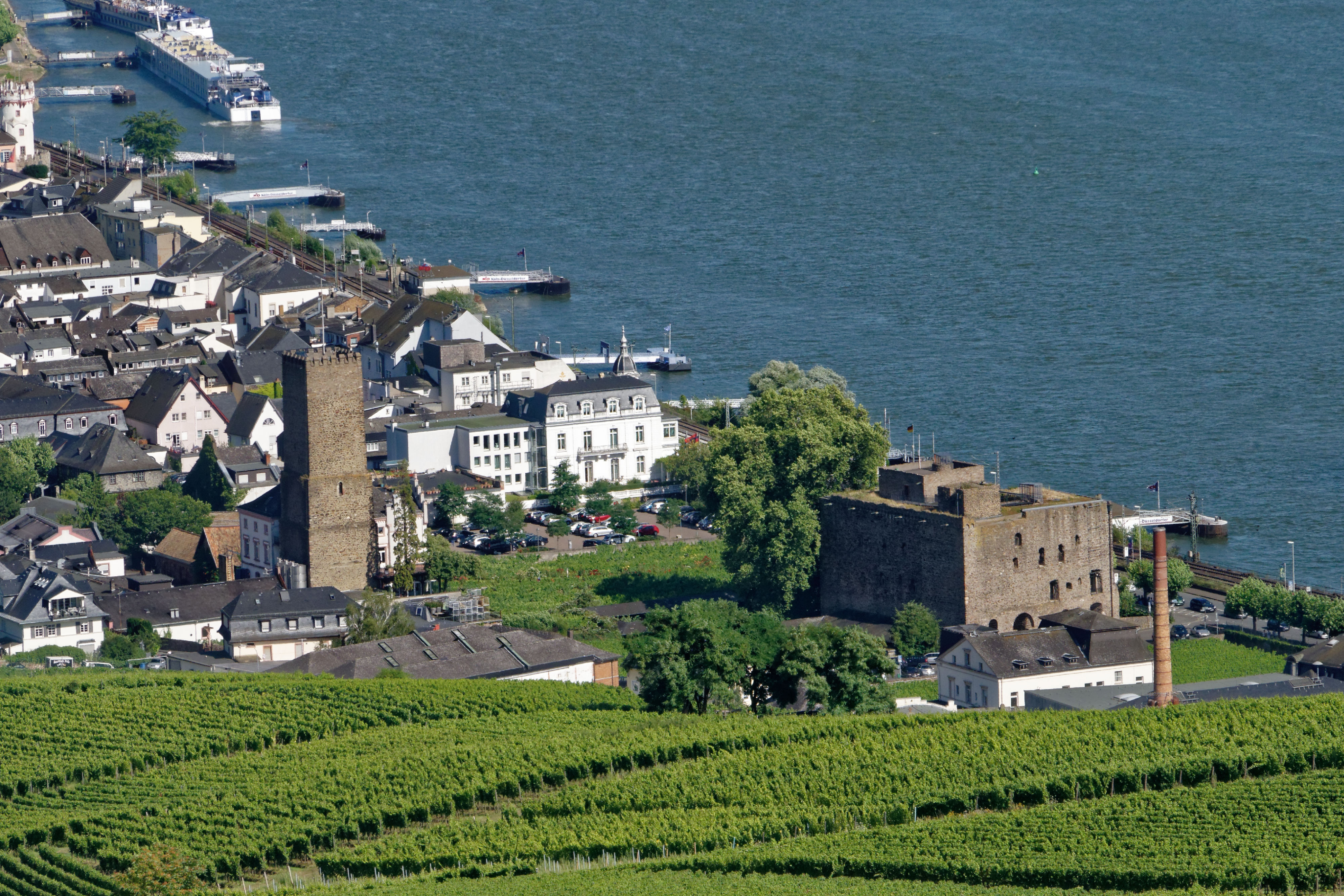 Rüdesheim Brömserburg Blick vom Niederwalddenkmal